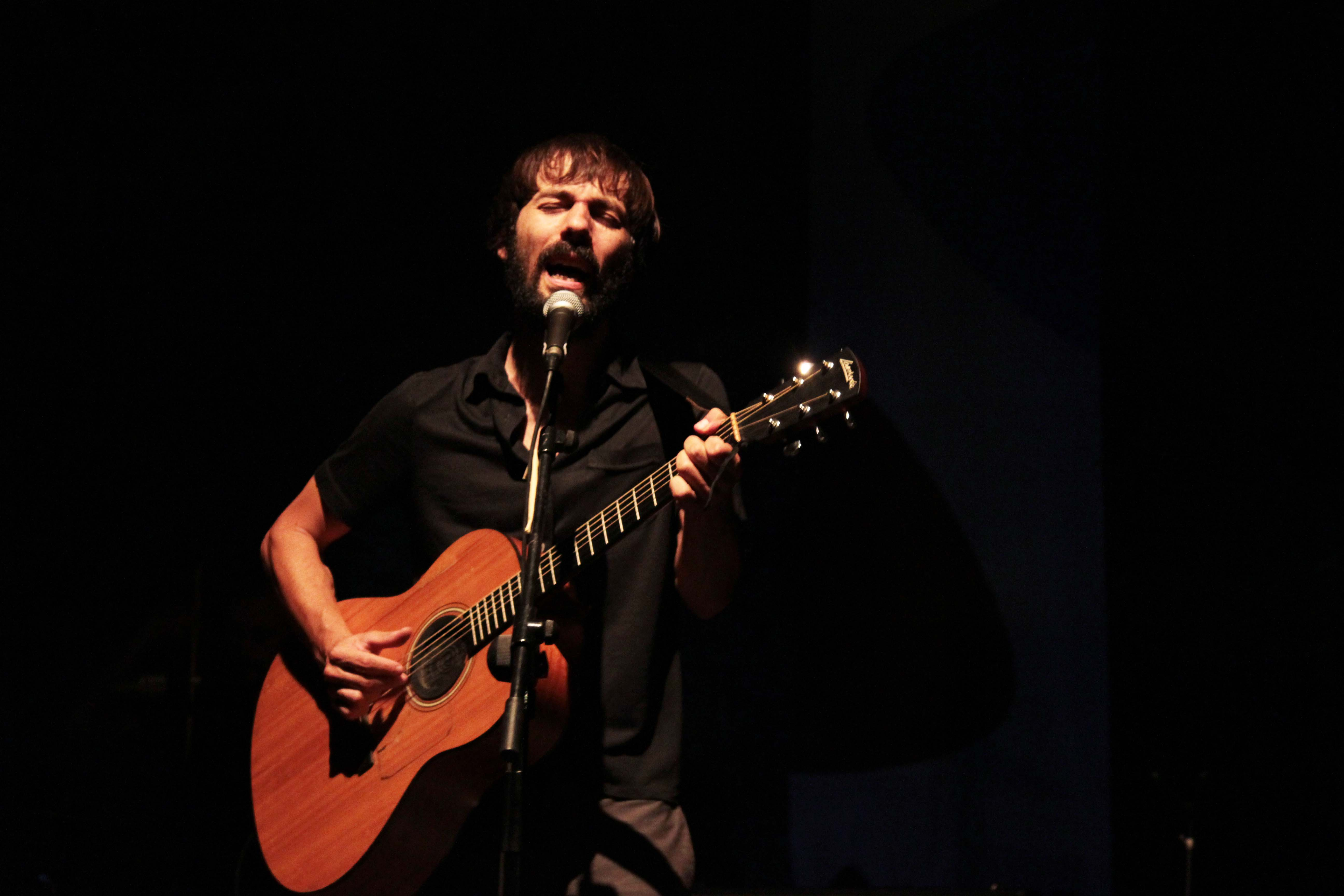 El cantante de Standstill Enric Montefusco en festival Ecopop de Avila en 2011